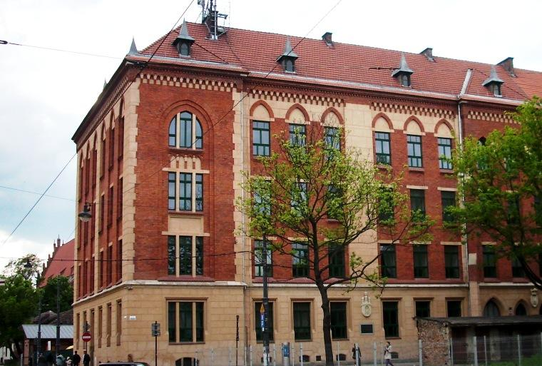 Przed wojną żydowska Szkoła Powszechna nr 22 na krakowskim "Kazimierzu", w czasie II w. św. obóz przesiedleńczy, obecnie VI L.O. im. A. Mickiewicza i Gimnazjum nr 3 im. Króla Kazimierza Wielkiego.